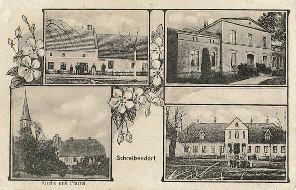 Pocztówka przedstawiająca kościół, dwór i budynki mieszkalne